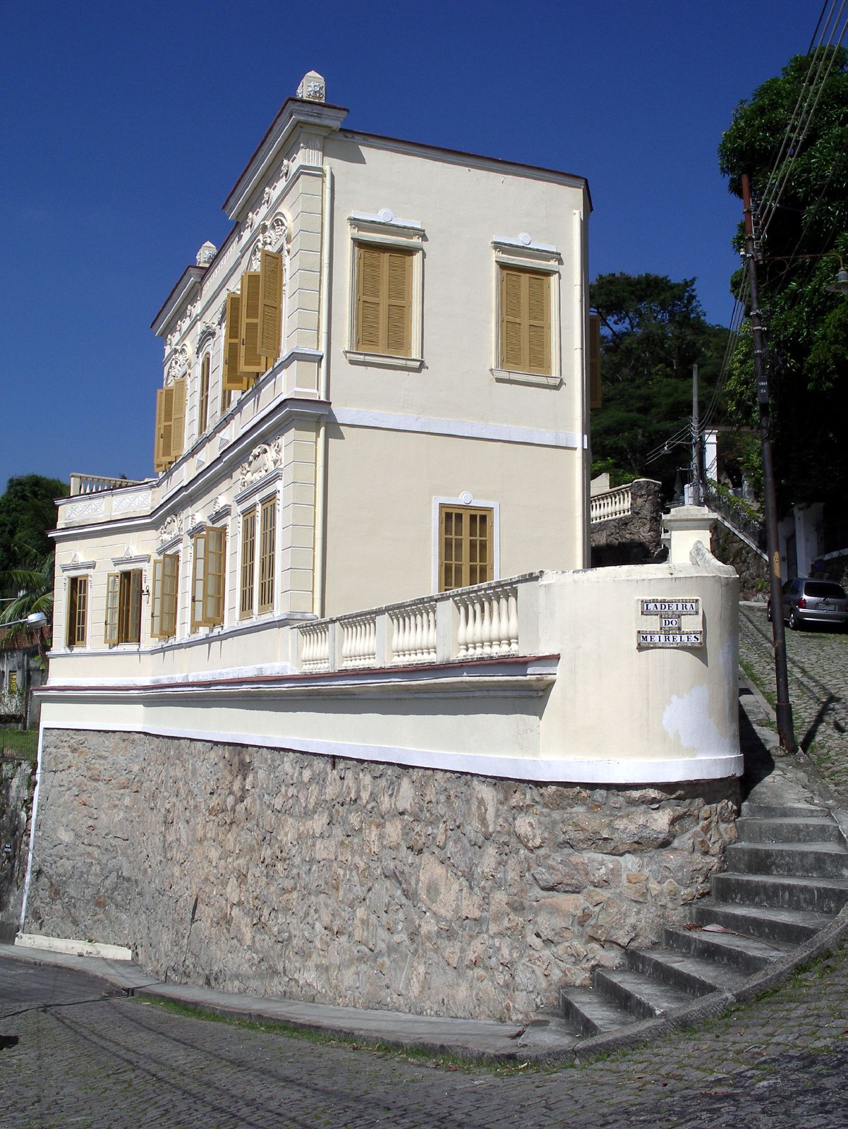 Santa Teresa neighbourhood in Rio de Janeiro, Brazil